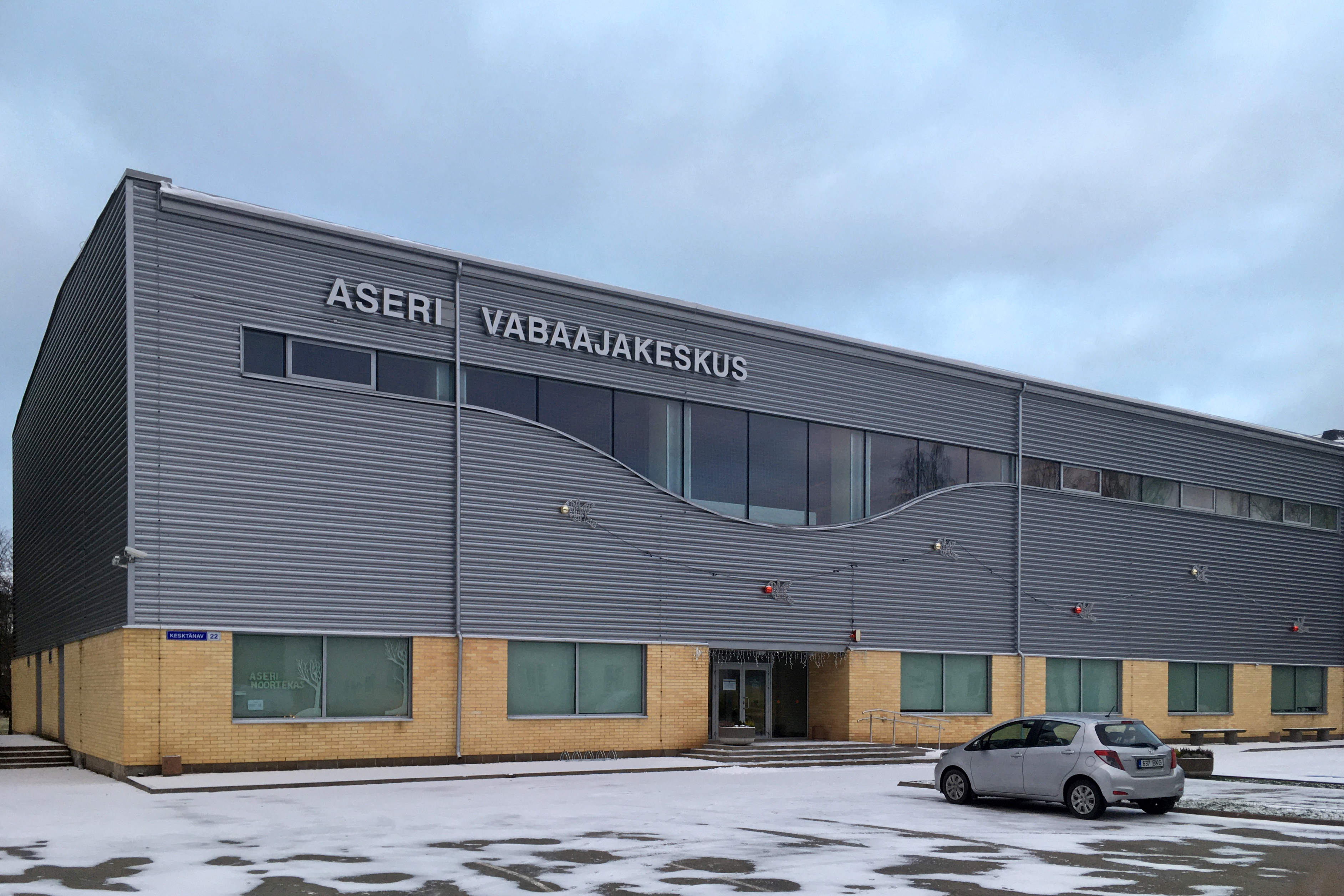 Центр досуга посёлка Азери, Эстония